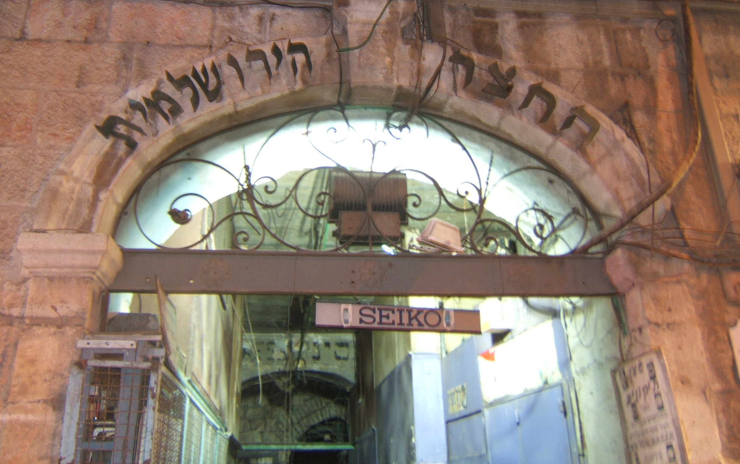 31 Jaffa Road, Jerusalem FEINGOLD COURTYARD